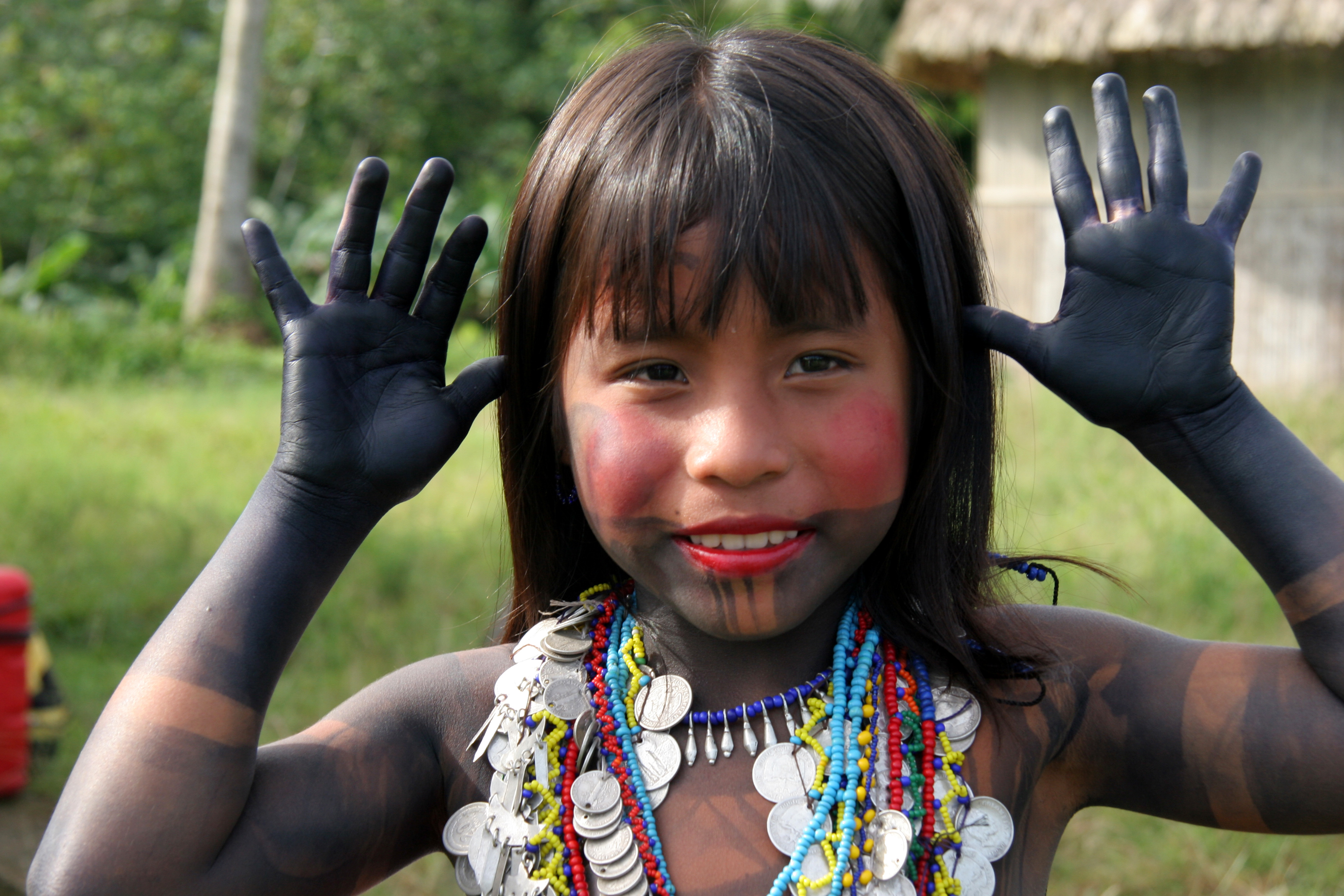 Panama, Darien, fillette habillée pour la danse